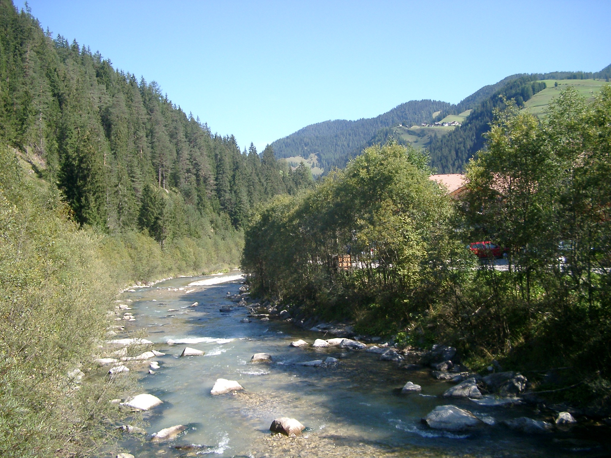 Der Gaderbach bei Pederoa in Wengen